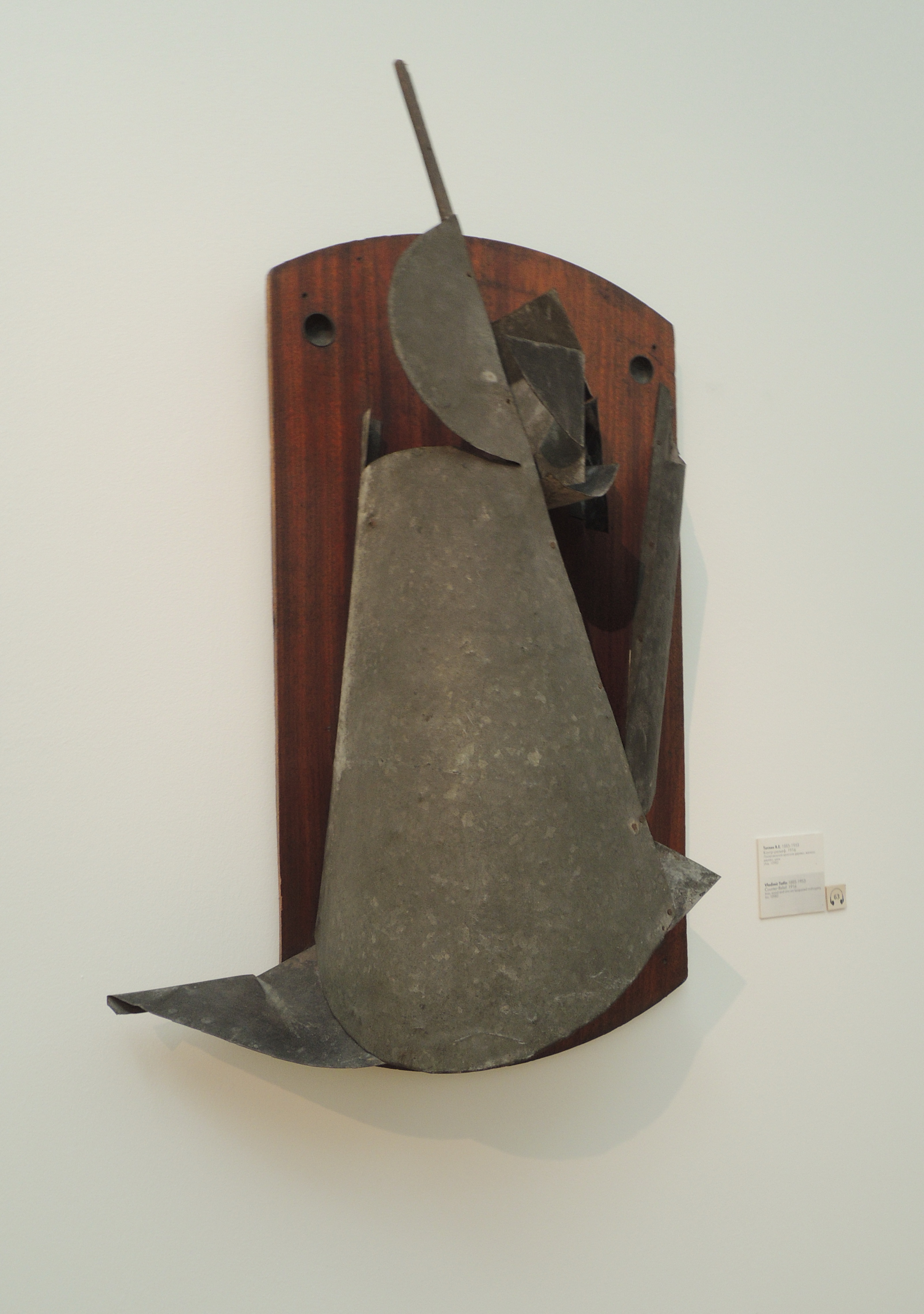 Владимир Татлин (1885-1953). Контр-рельеф, 1916. Лакированное красное дерево, железо, дерево, цинк. ГТГ. Инв. 10982.